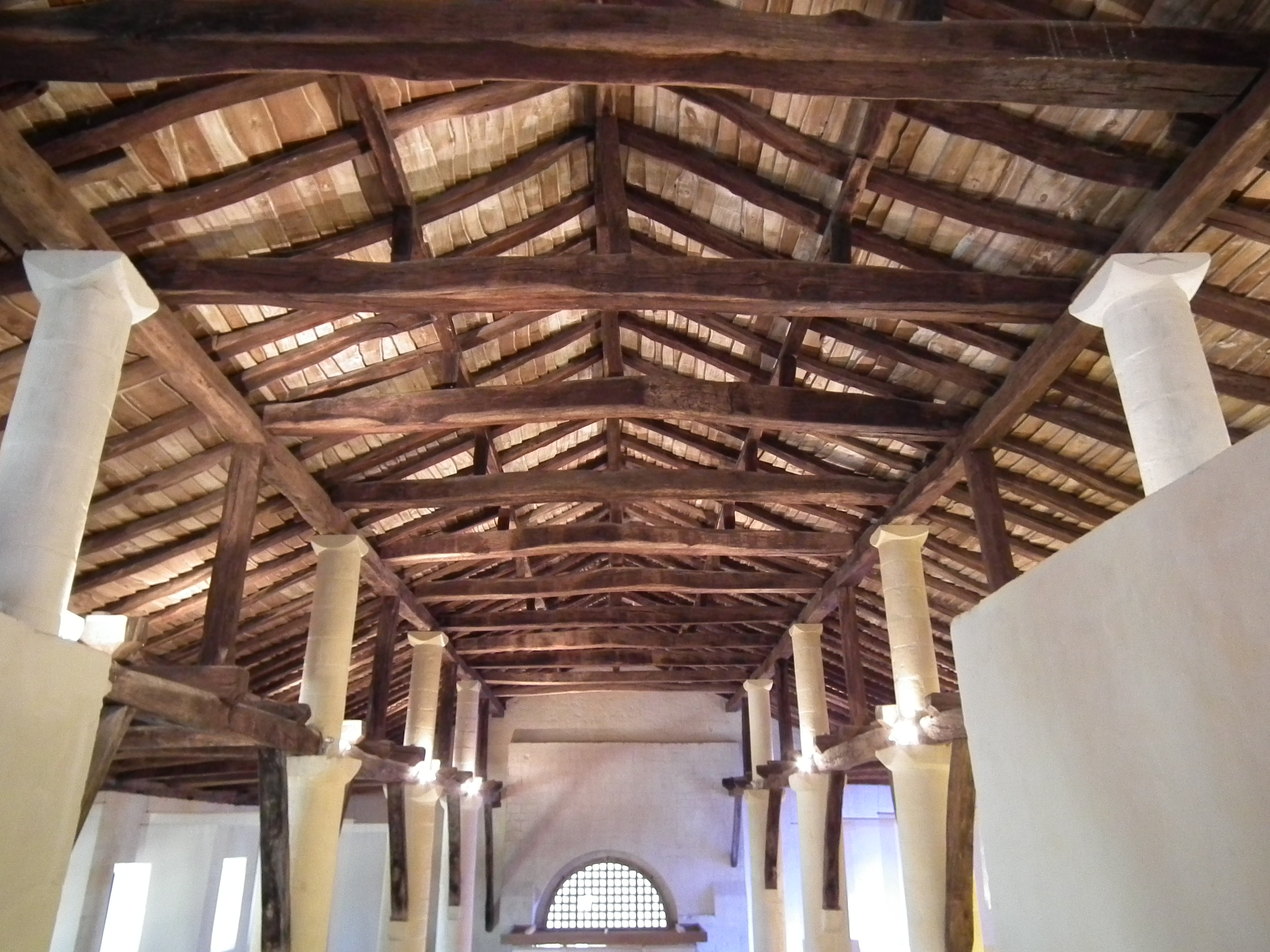 Détail de la charpente de l'hôpital des pèlerins de Pons